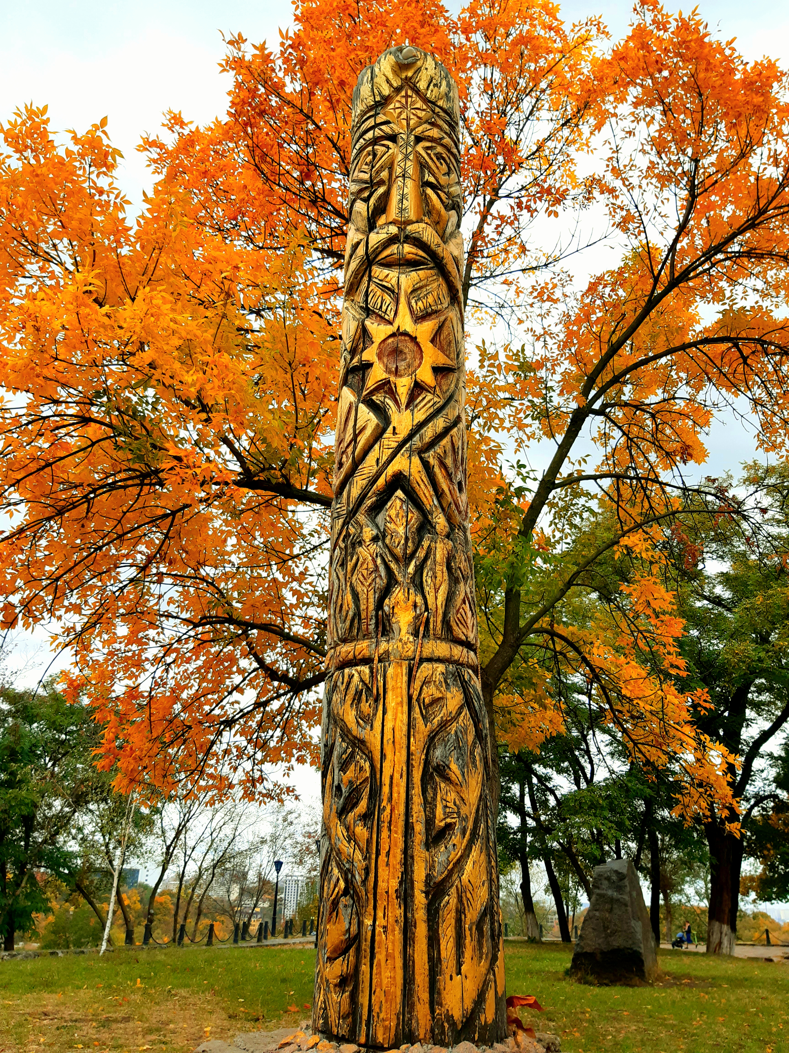 Язичницький ідол на Старокиївській горі (відтворений). Київ